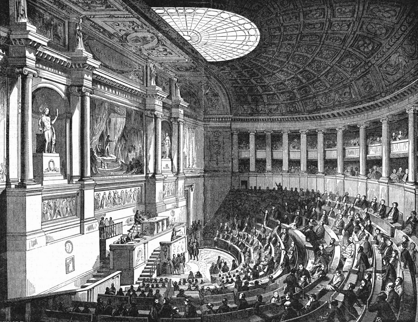 Der Sitzungssaal der Deputirtenkammer in Paris.